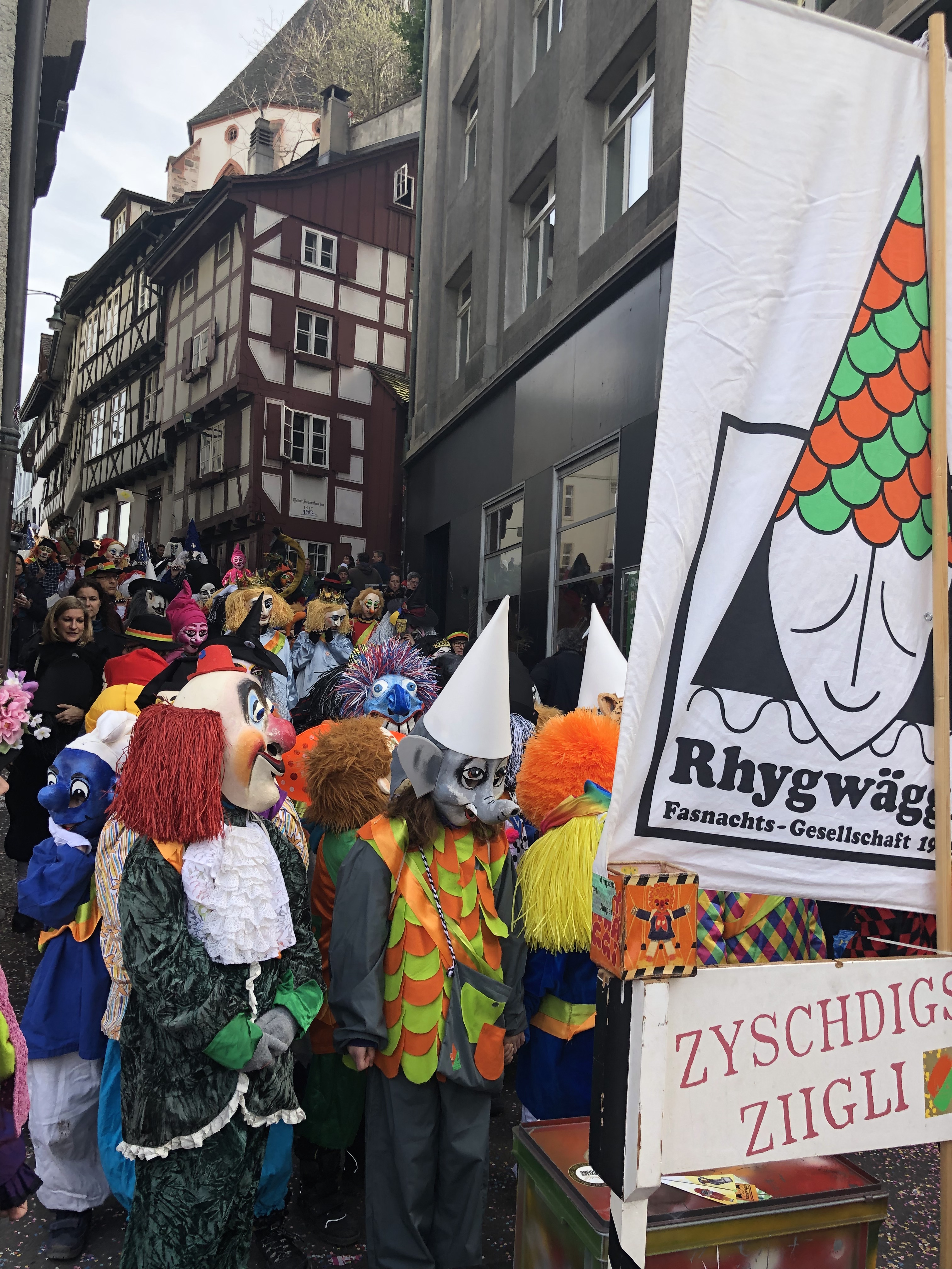 Photo prise pendant le carnaval de Bale le mardi 12 mars 2019